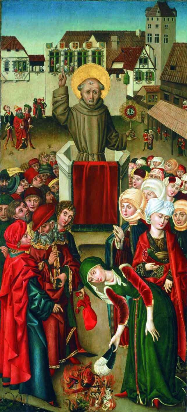 Johannes Capistranus Fränkisch-Bambergische Tafelmalerei